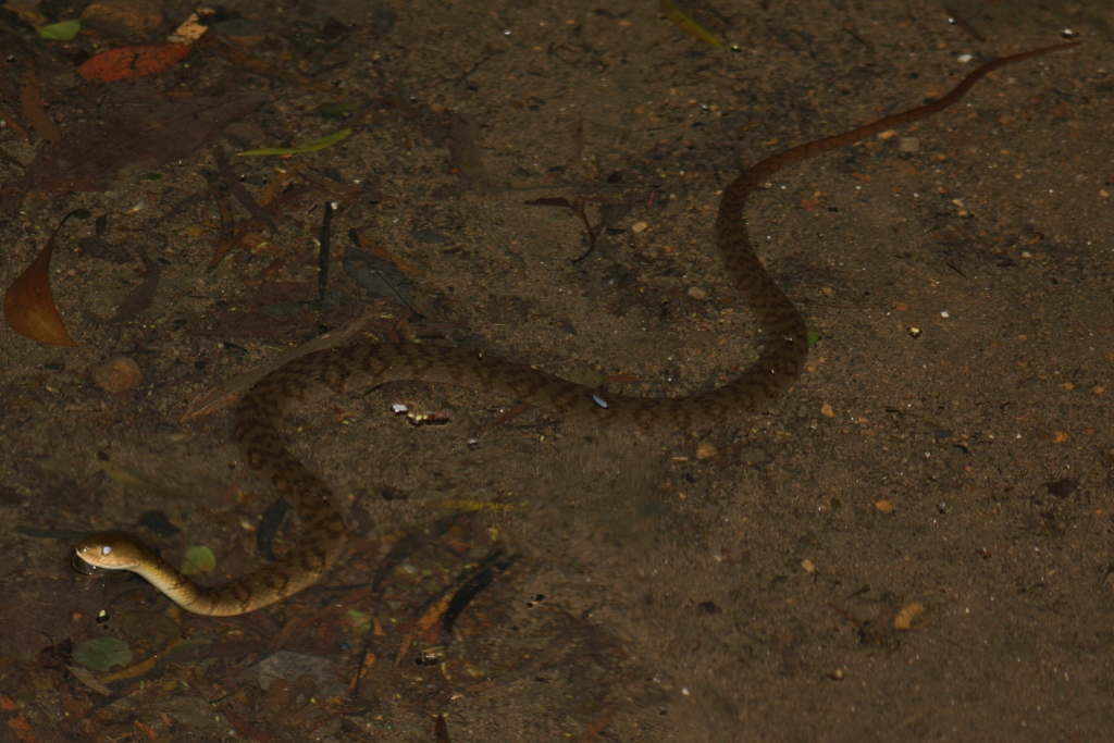 Mountain Water Snake (Sinonatrix percarinata) Taken at Tai Mo Shan.